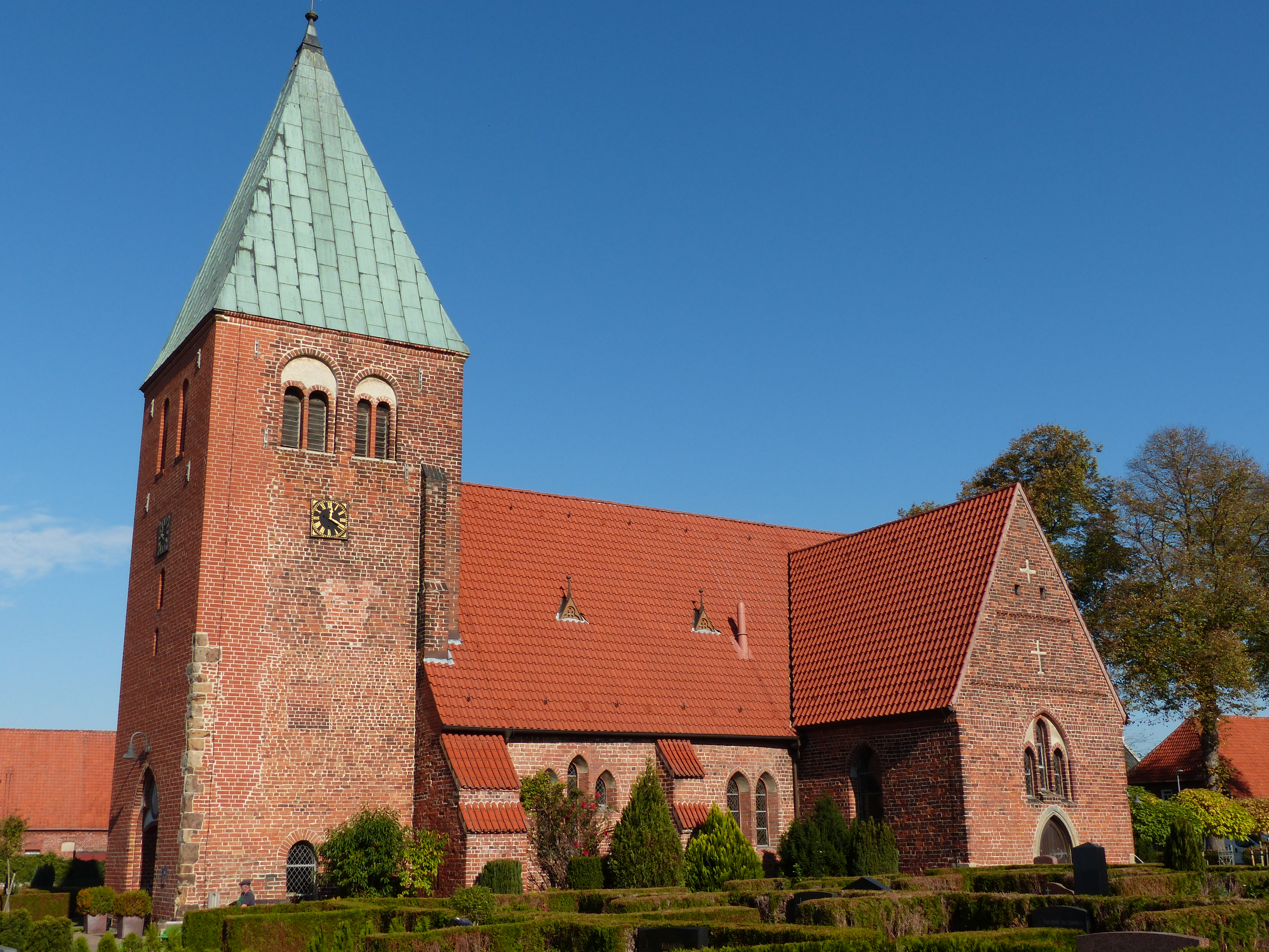 Andreaskirche in Riede von Süden